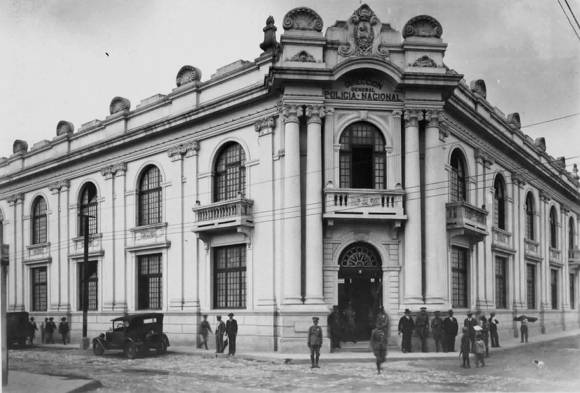 Dirección General de Policía aproximadamente en 1930. Ciudad de Guatemala.